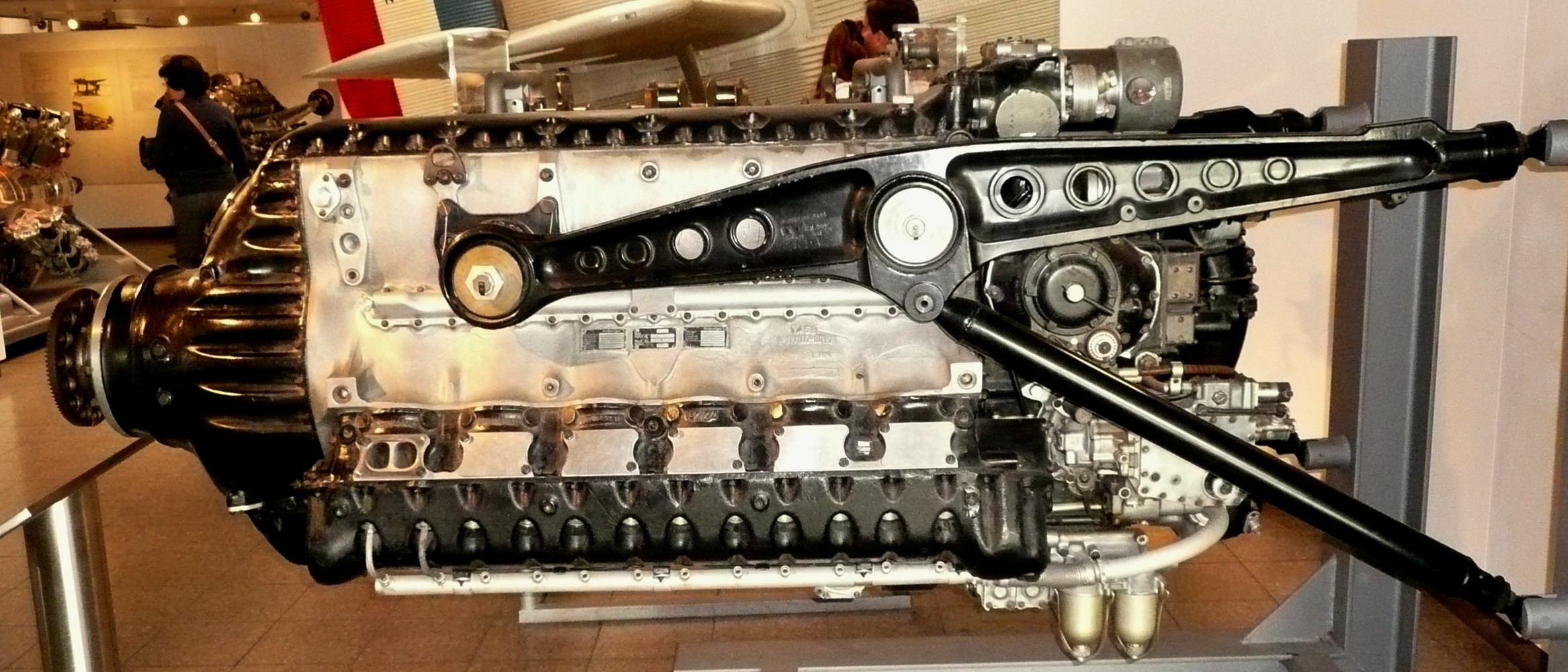 Junkers Flugzeugmotor Jumo 213 A ausgestellt im Deutschen Museum München.